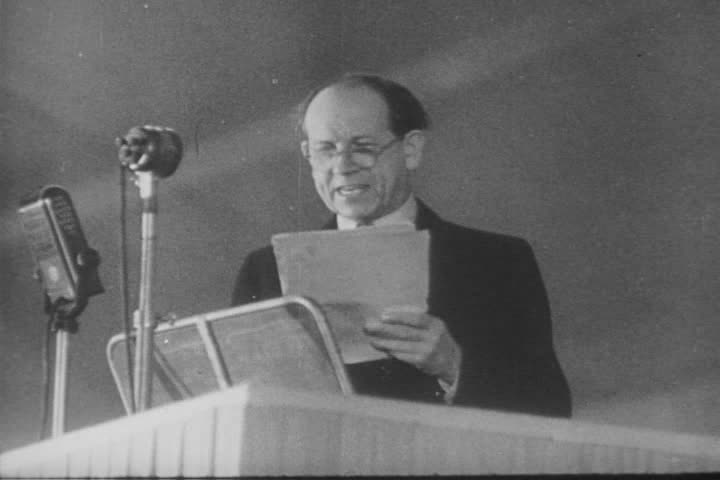 Antonín Zápotocký, záběr z amerického filmového týdeníku "The March of Time".